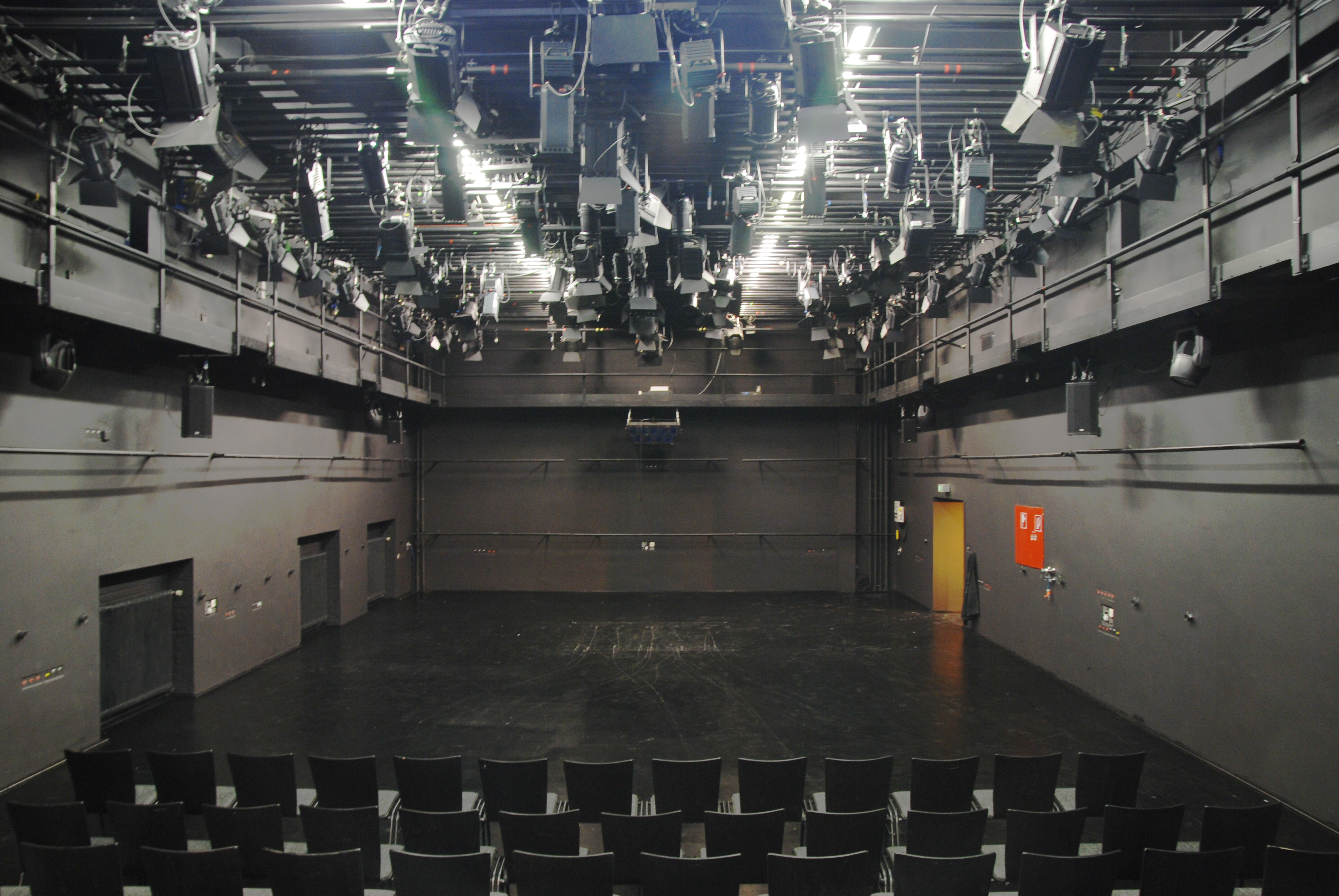 Nationaltheater Mannheim, Werkhaus, Blick von der Tribüne